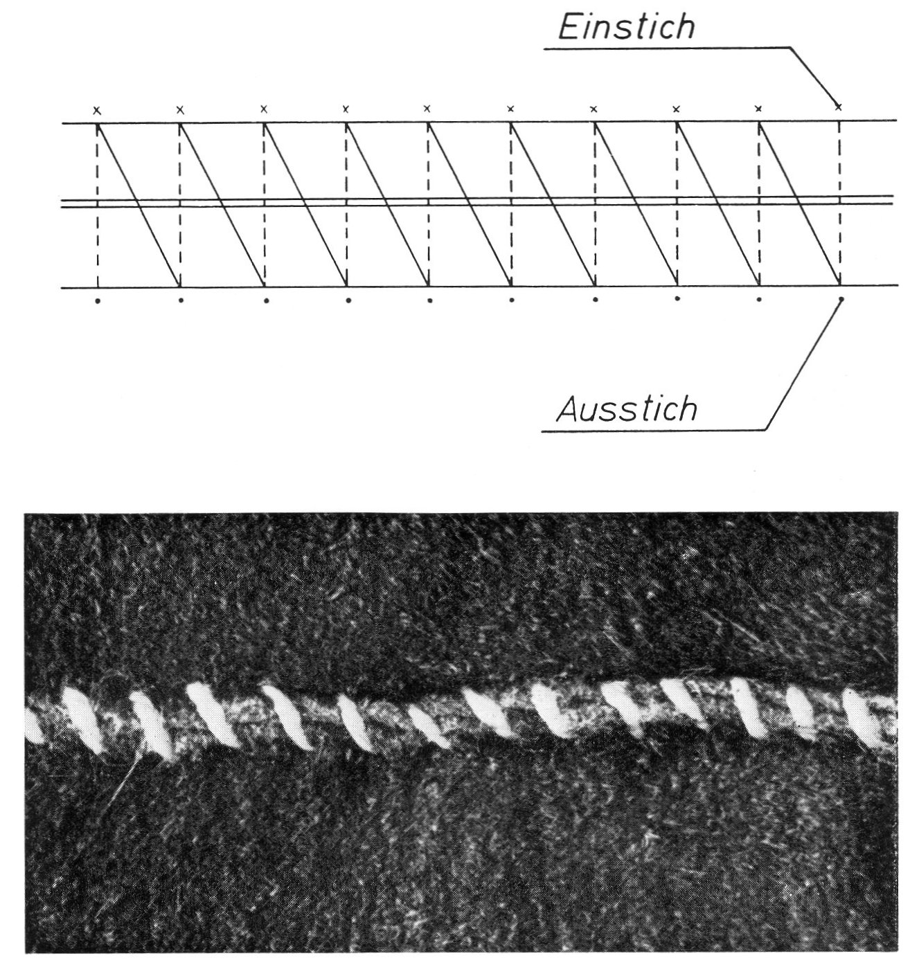 Nähte in der Kürschnerei: Absatz „Nähtechnik, Ledernähte, Überwendliche Naht“.